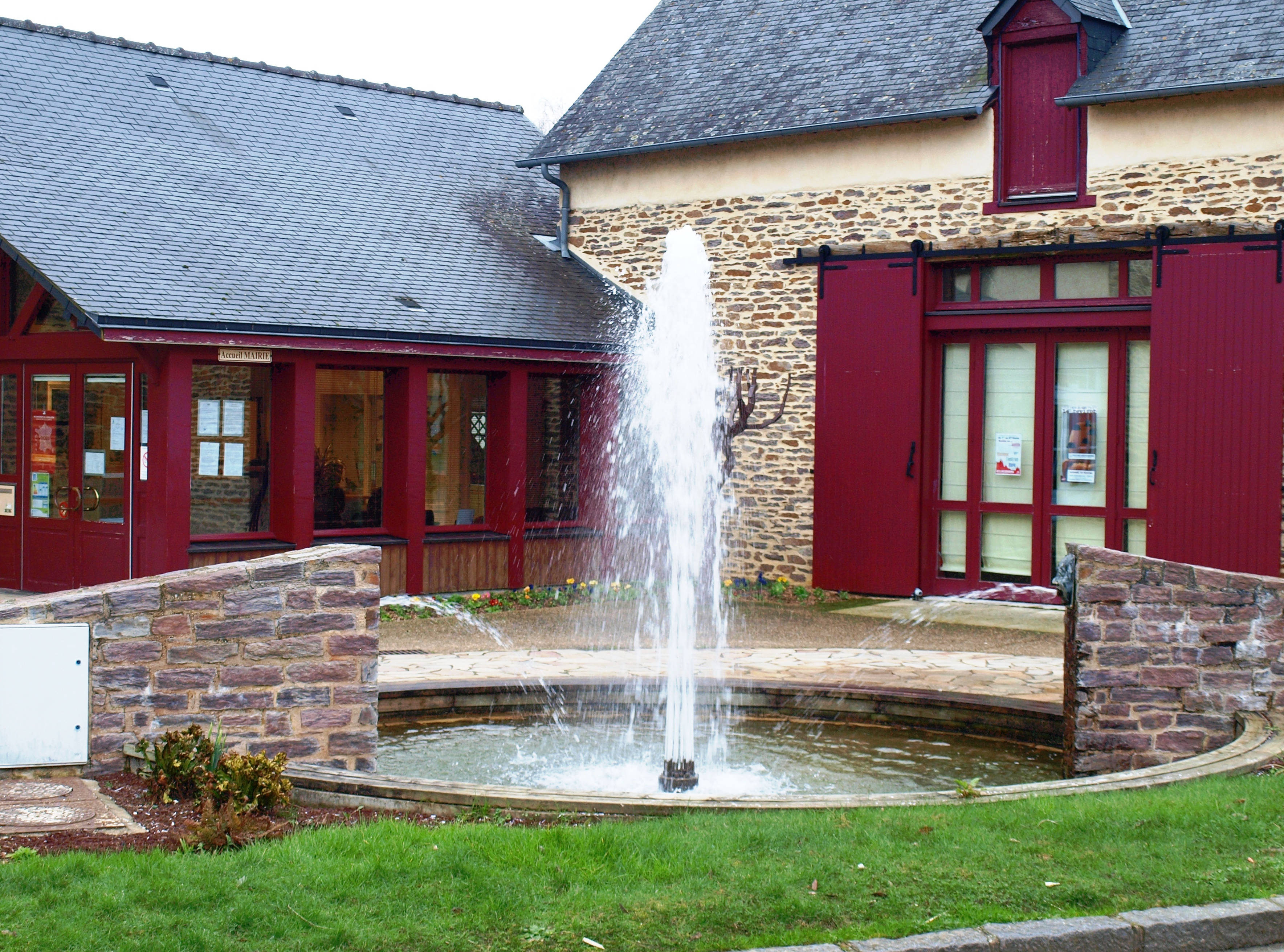 Bourgbarré (Ille-et-Vilaine, France) ; mairie.